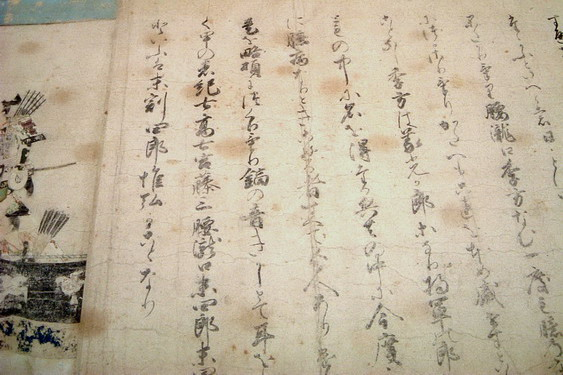 貞和版『後三年合戦絵詞』の詞文